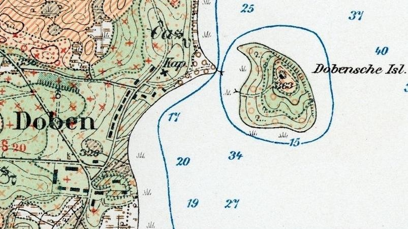 Messblattausschnitt